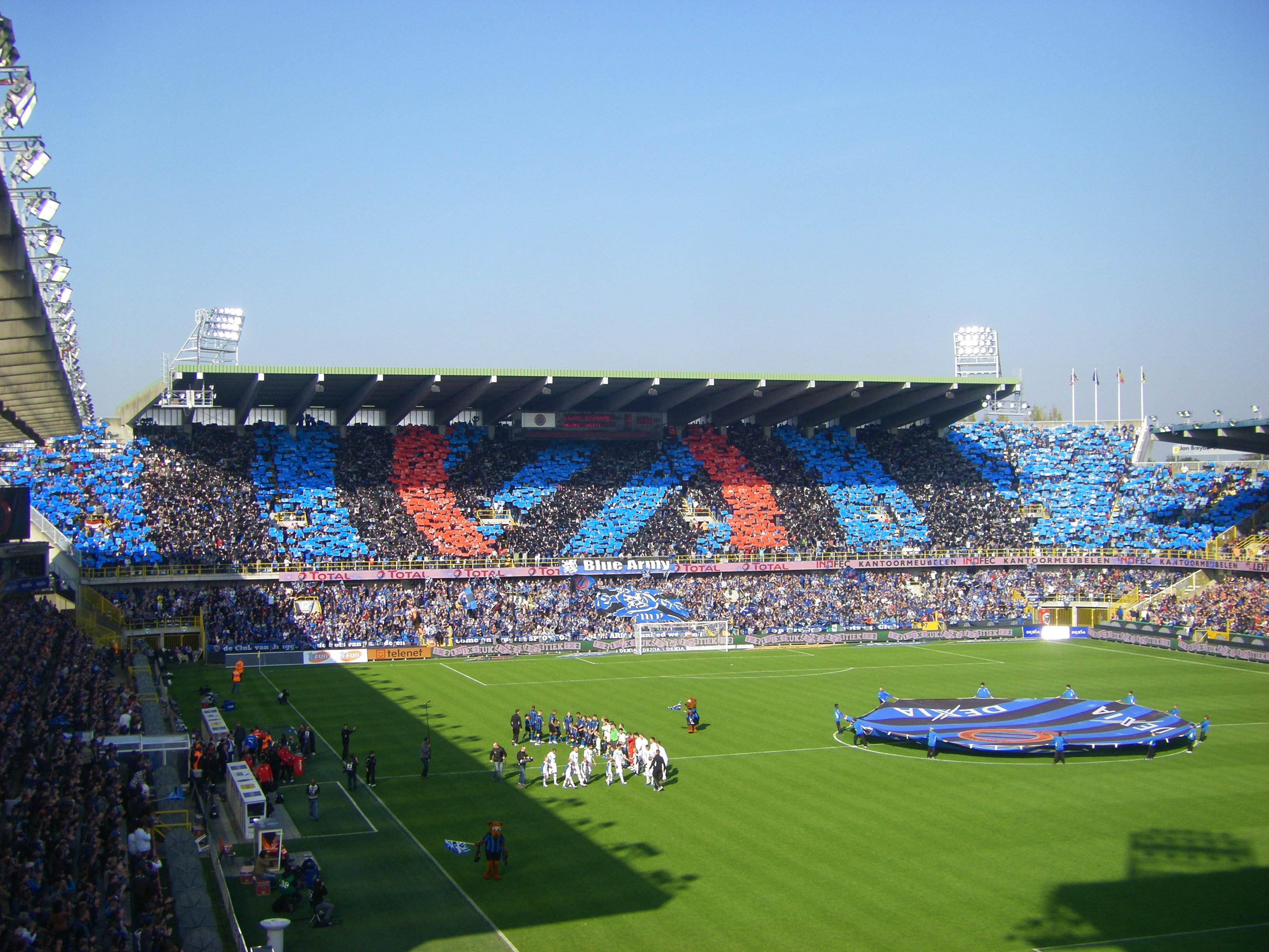 Choreografie der Fankkurve des FC Brügge vor dem Ligaspiel gegen KAA Gent am 16.10.2011